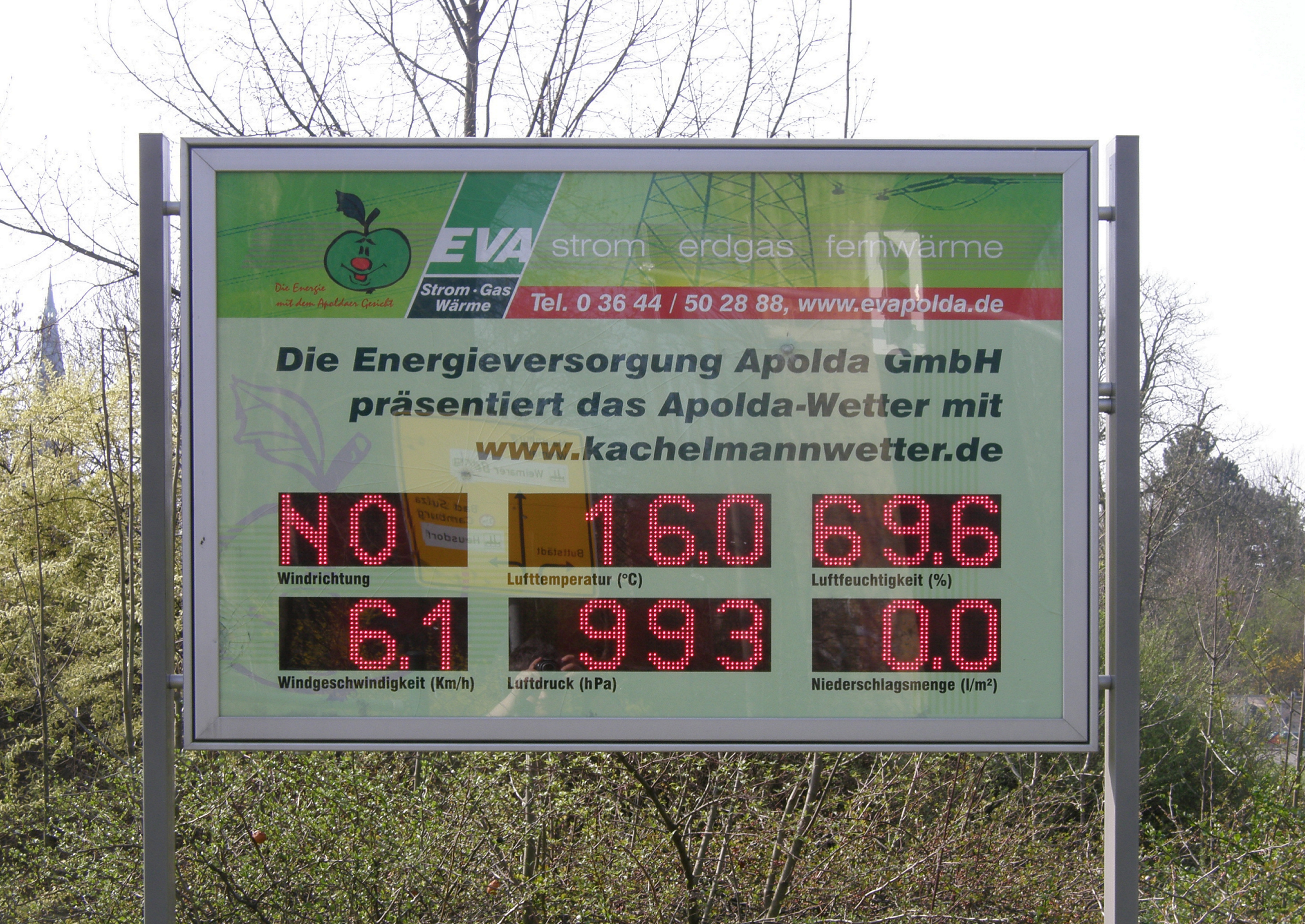 Stadt Apolda - Wetterinformation von kachelmannwetter.de und der EVA